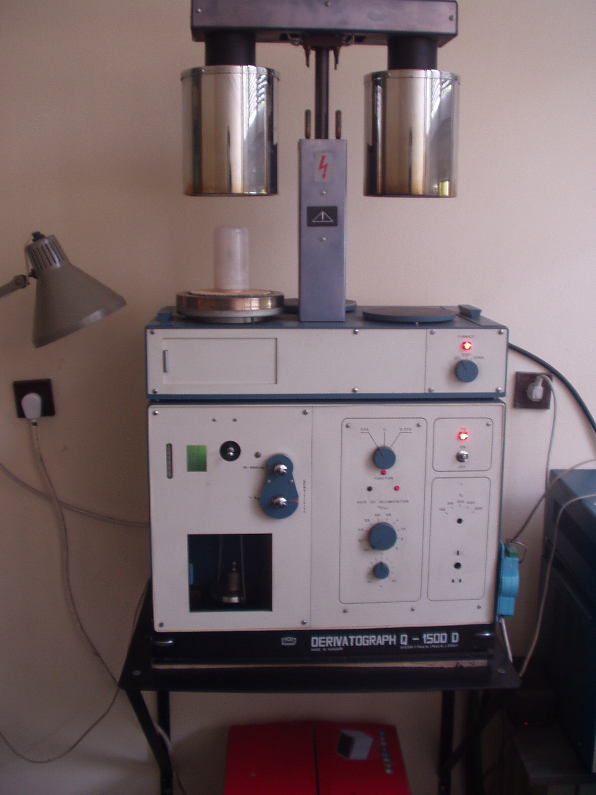 Jest to derywatograf węgierskiej firmy MOM systemu F. Paulik, J. Paulik, L. Erdey.